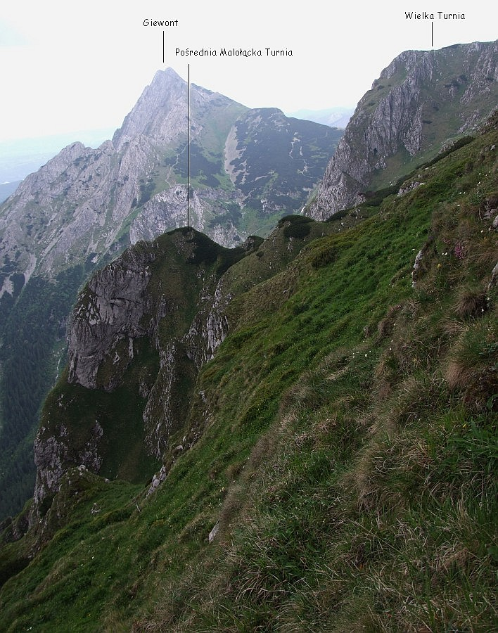 Pośrednia Małołącka Turnia i Wielka Turnia. W głębi Giewont